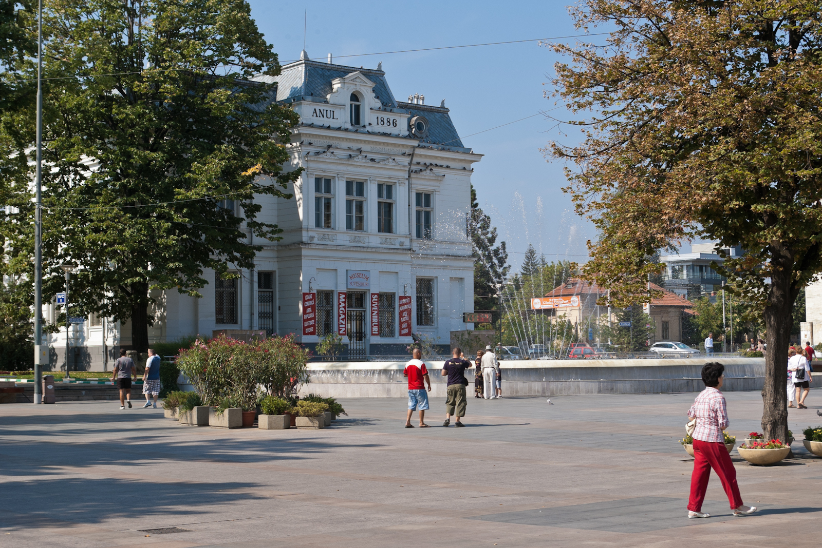 Fotografia prezinta Primaria veche, azi Muzeul de Arta, vazut dinspre NE.